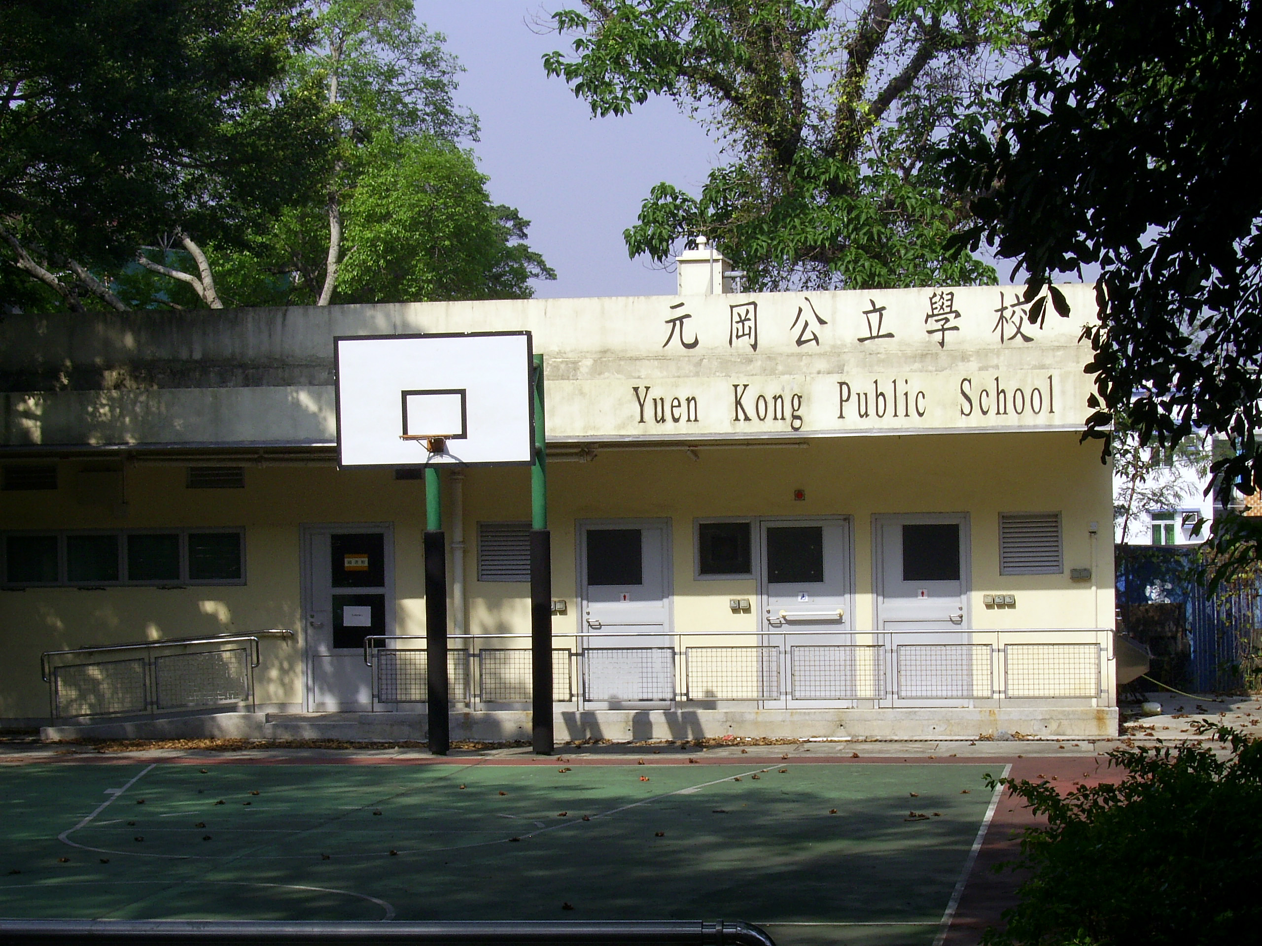 中文（香港）: 元岡公立學校